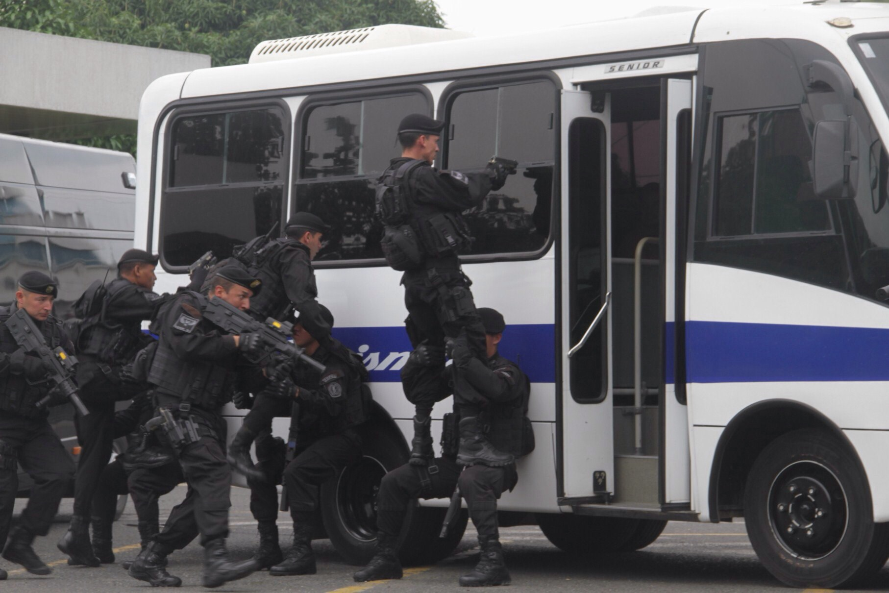 Dispositivo de seguridad para la 3a Cumbre Mundial de Alcaldes y Mandatarios Afrodescendientes Cali-Cartagena